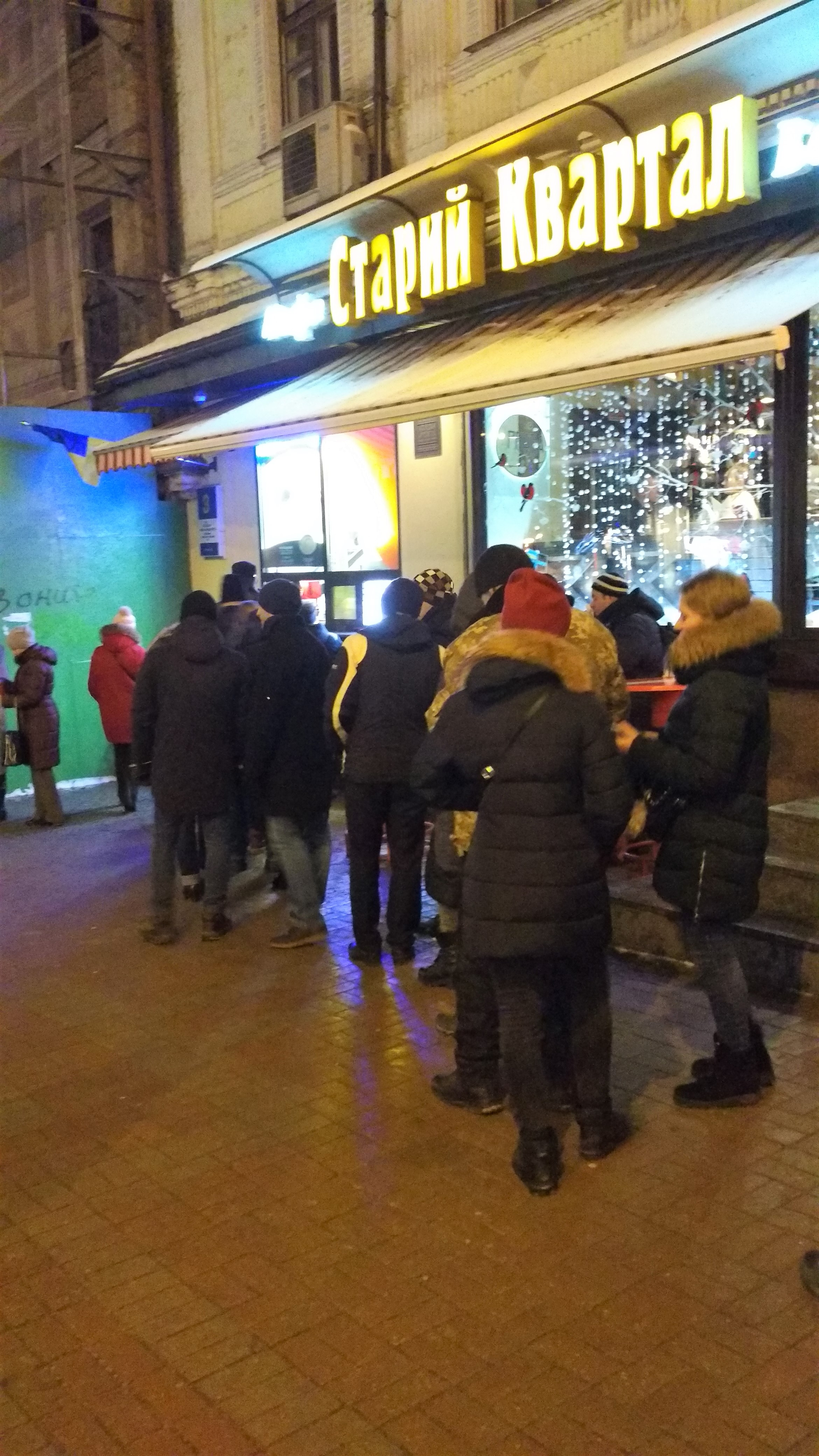 Черга за київською перепічкою січневим вечором 2019 р.